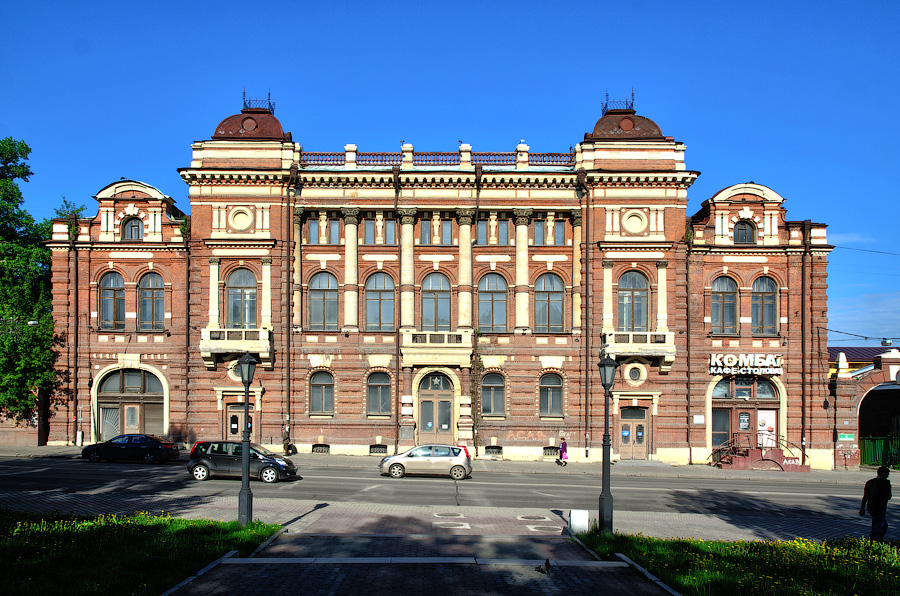 Здание Общественного собрания (Томская область, Томск, Ленина проспект, 50)